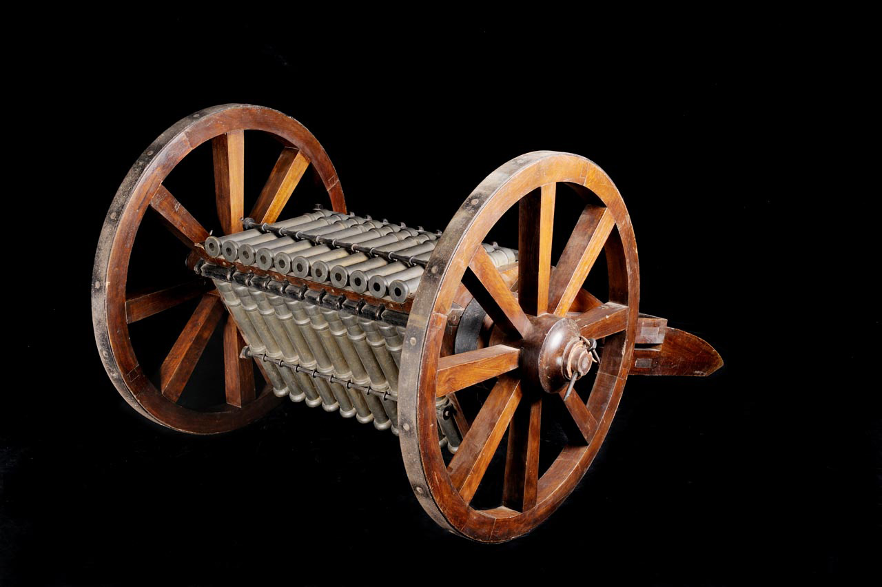 Questo modello rappresenta una batteria di cannoni costituita da 33 piccole bocche da fuoco ordinate in tre file da 11 ciascuna su unico telaio rotante. Le bocche da fuoco ad avancarica sono fissate al telaio con una cerniera che ne permette la rotazione verso l'alto per il caricamento. Una vite senza fine è inserita nell'affusto Funzione Il cannone multiplo ad avancarica e bocca da fuoco in bronzo, era destinata ad affiancare le azioni della fanteria. Modalità d'uso Scaricata la prima fila, l'artigliere avrebbe potuto successivamente mettere in posizione di fuoco la seconda e la terza. Una volta caricate, le canne sono trattenute in posizione da un'asta di metallo fissata ai lati mediante cavicchi. La vite senza fine permetteva di variare l'alzo del tiro.